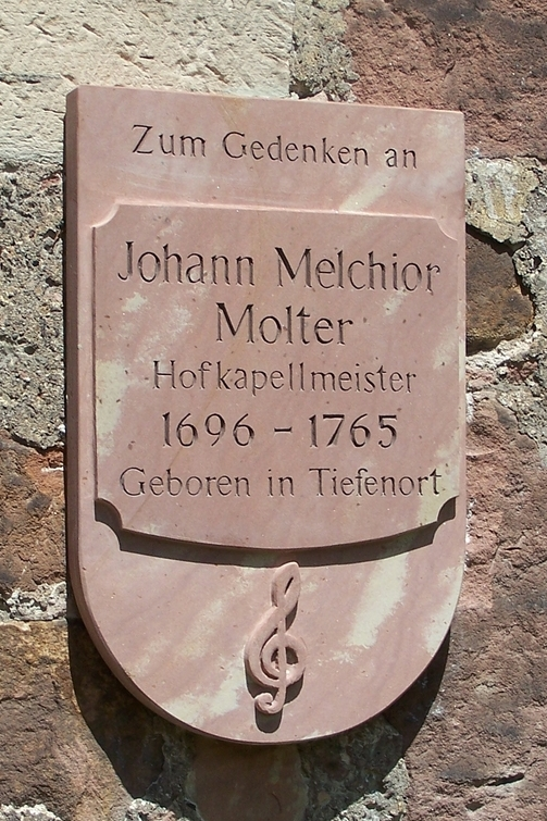 Gedenktafel am Hauptportal der Kirche.